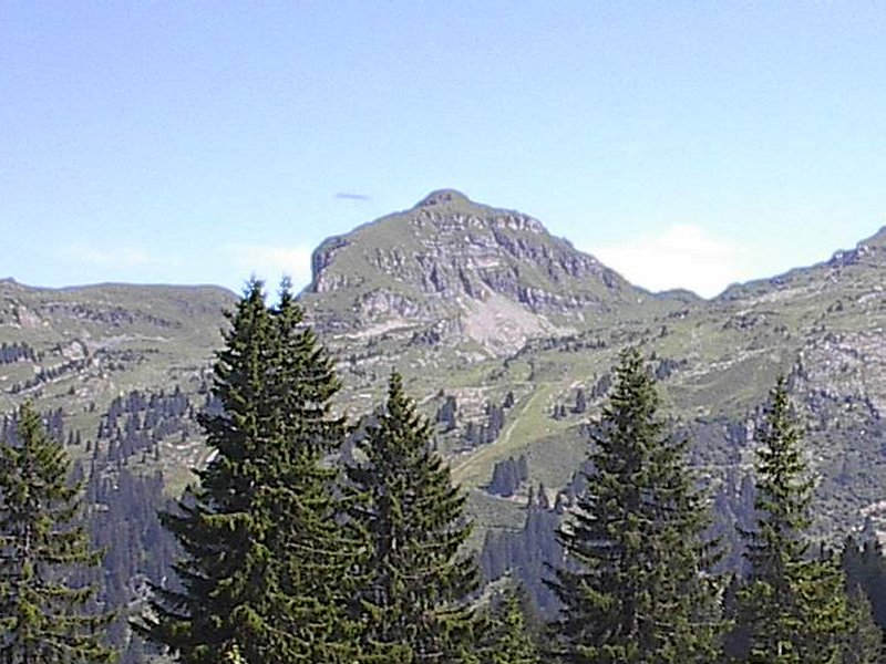 La Tête du Géant vue côté France Photo J.J.Roland (22.08.2001)